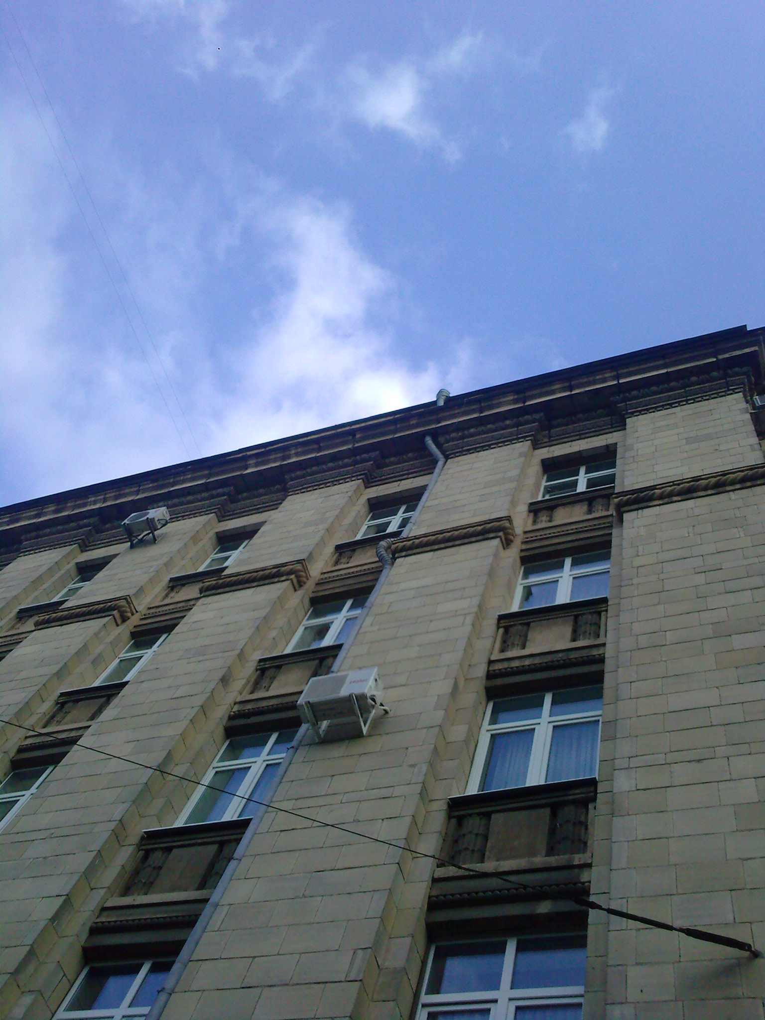 Здание_областной_администрации